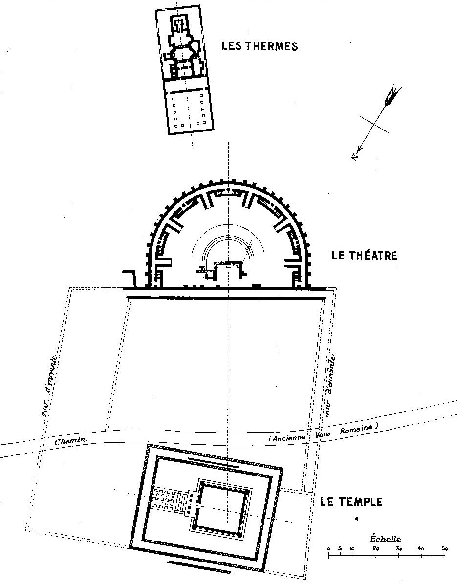 « Plan d'ensemble des ruines des monuments gallo-romains découverts sur le plateau cultivé de Champlieu, comprenant un temple, un théâtre et des thermes ».